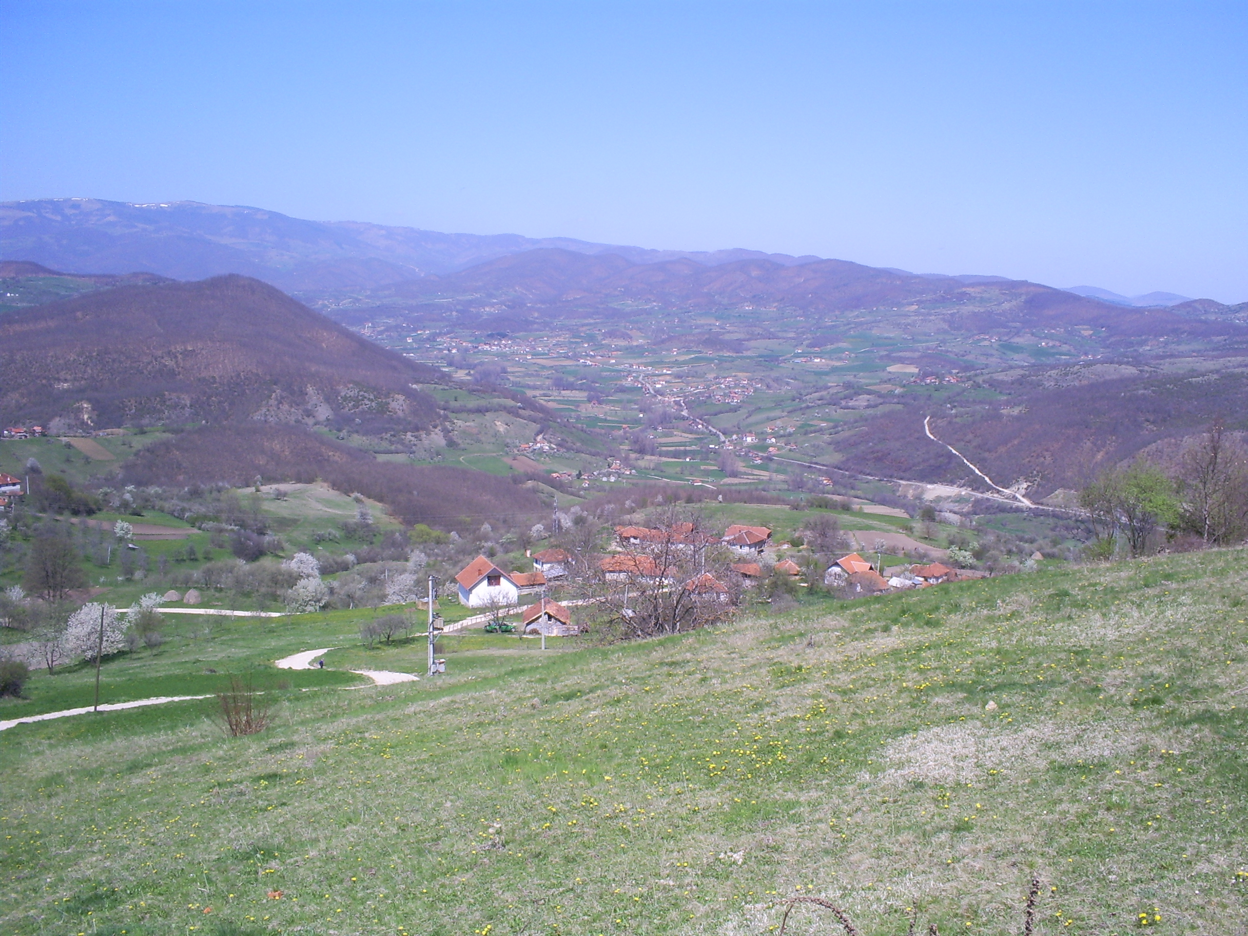 Pogled sa brda na kome se nalazi manastir Djurdjevi Stupovi